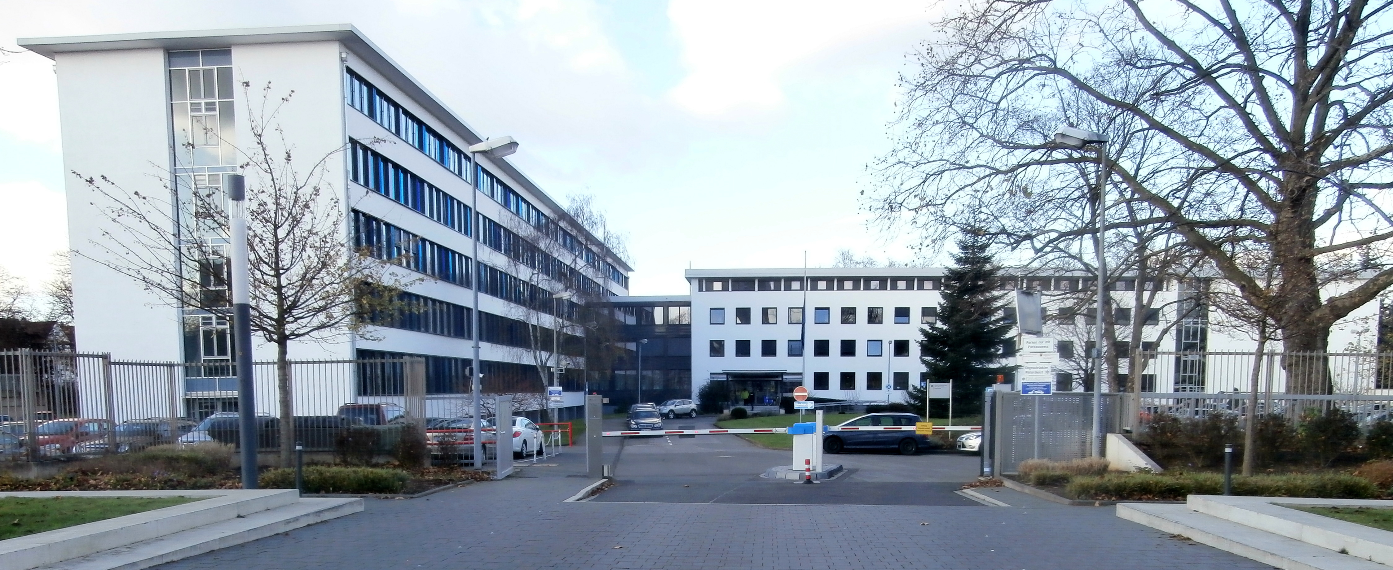 Presse- und Informationsamt der Bundesregierung, Welckerstraße 2, Bonn-Gronau